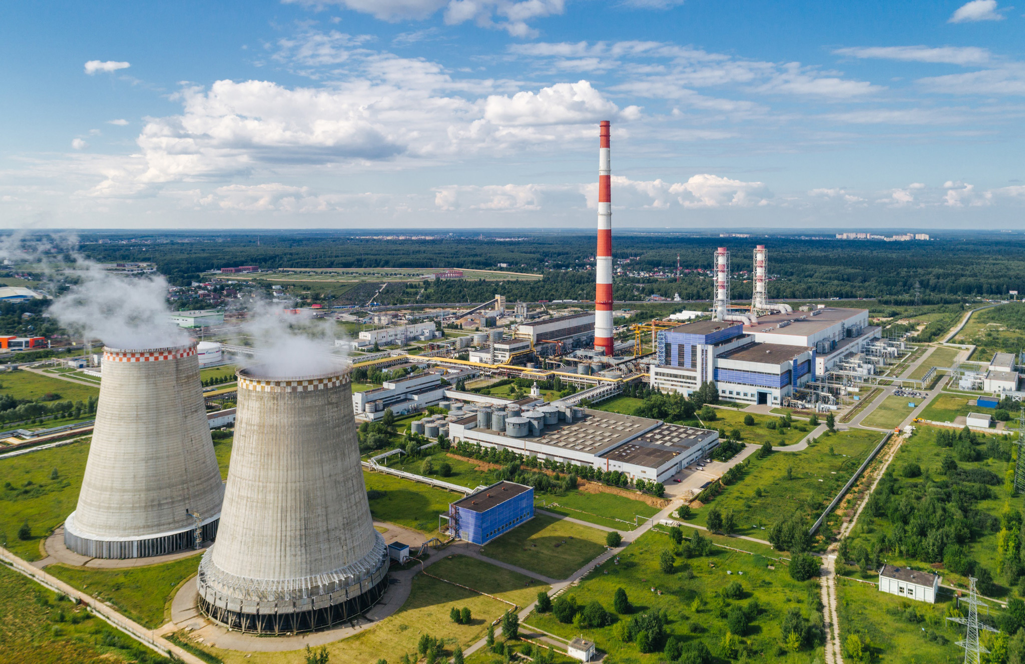 ТЭЦ-27 филиал компании ПАО «Мосэнерго»